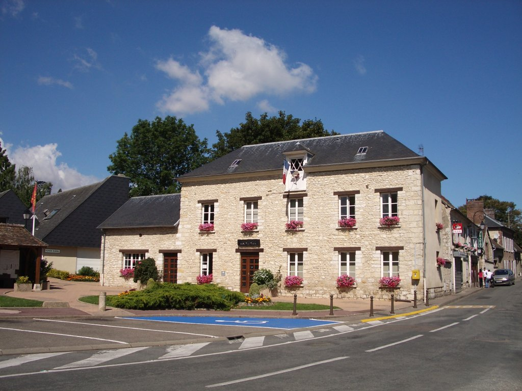 La mairie de Saint-Just (Eure)